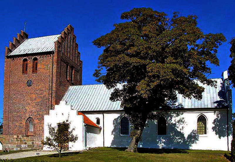 fra syd